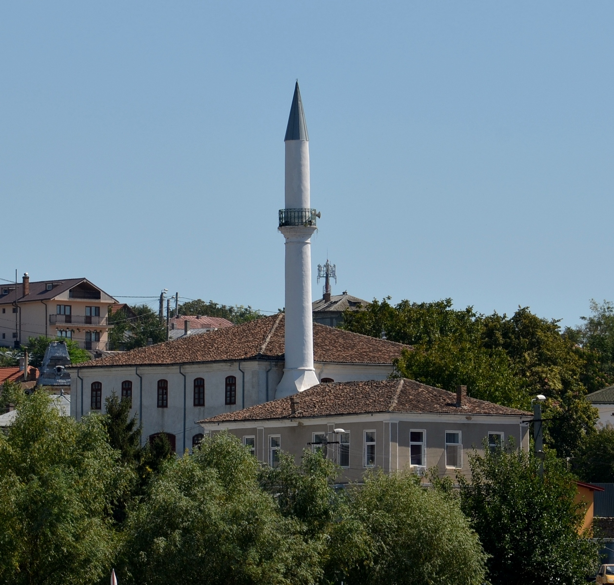 Moscheea Azizyie